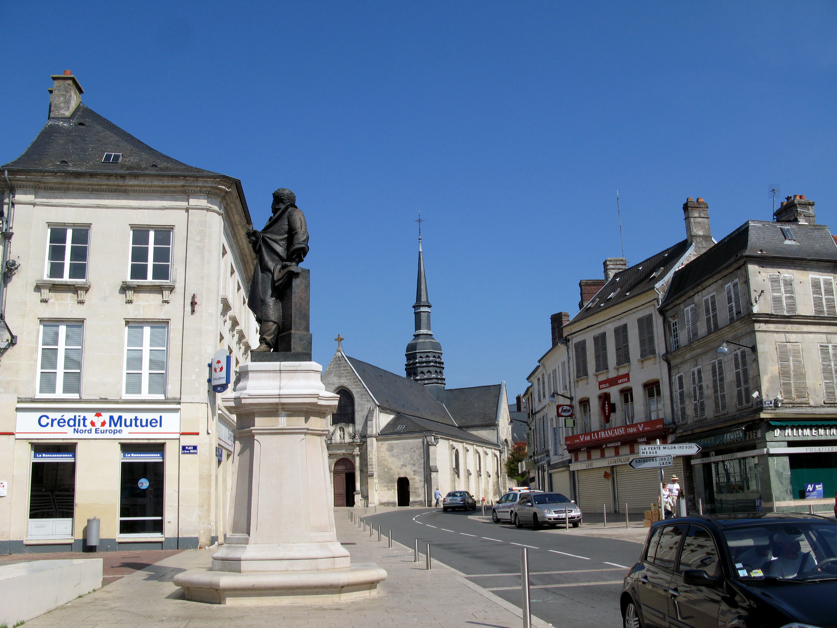 Villers-Cotterêts (Aisne, France) - Vue depuis la place centrale, la statue d'Alexandre Dumas, avec l'église Saint-Nicolas en arrière-plan. . .